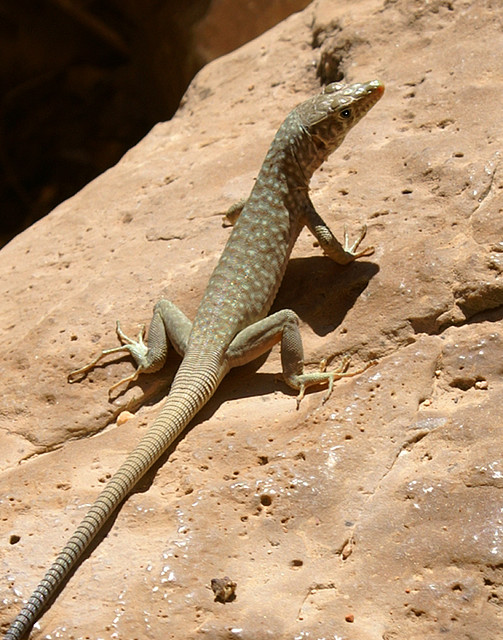 Lizard (Oman)